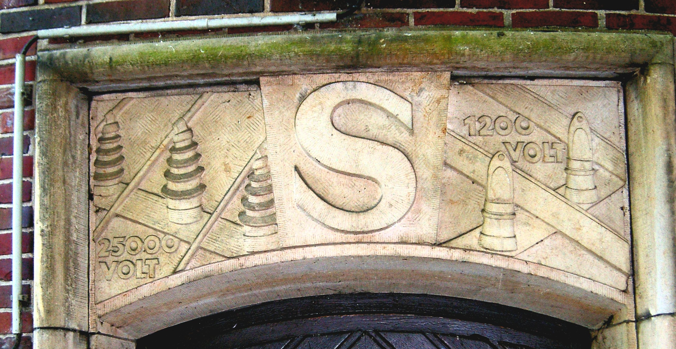 Eingangsportal des Gleichrichterwerks der S-Bahn am Bahnhof Berliner Tor in St. Georg.